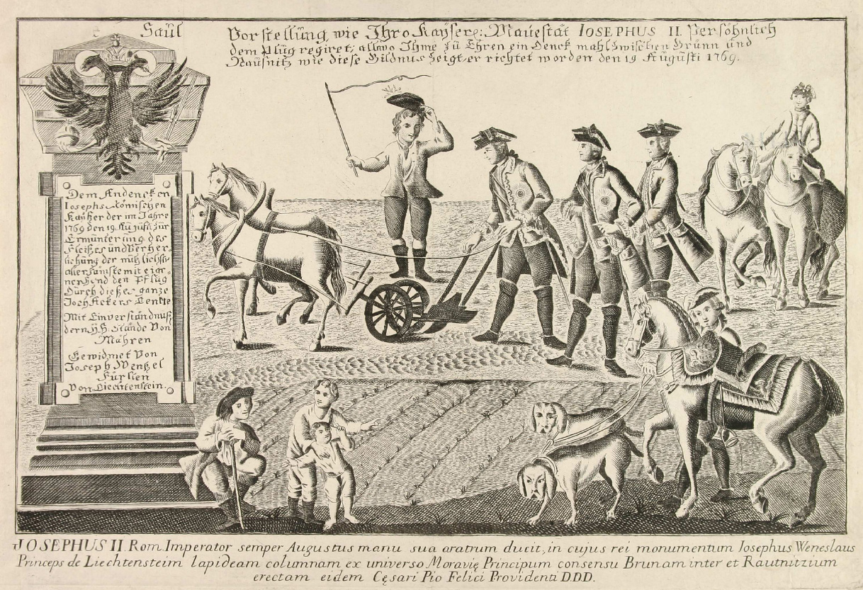 Joseph II. führt den Pflug. Das als "Furchenzug" bekannt gewordene Ereignis fand 1769 im mährischen Slavíkovice/Slawikowitz statt. Während seine Kutsche am Weg repariert werden musste, half der Kaiser dem Bauer Andreas Trnka und dessen Knecht Jan Kartoš beim Pflügen. Anonymer Kupferstich, 1769. Sbírka pohledů Moravské zemské knihovny v Brně (Sammlung von Ansichten der Mährischen Landesbibliothek in Brünn), Signatur č. 91.416. Text: "Vorstellung, wie Ihro Kaÿserl. Ma(ÿ)estät IOSEPHUS II. Persöhnlich dem P(f)lug regiret; allwo Ihme zu Ehren ein Denck mahl zwischen Brünn (Brno) und Rausnitz (Rousínov) wie dieses Bildnus zeigt, er richtet worden den 19. Augusti 1796." Inschrift am Denkmal: "Dem Andencken Iosephs Römischen Kaÿßer der im Jahre 1769 den 19. Augusti für Ermunterung des Fleißes und Verherlichung der nützlichst(en) aller Künste mit eigener Hand den Pflug Durch dießes ganze Joch Ackers Lenkte. Mit Einverständnuß dern H. H. Stände von Mähren. Gewidmet Von Joseph Wentzel Fürsten Von Liechtenstein." Lateinische Bildunterschrift: "JOSEPHUS II. Rom. Imperator semper Augustus manu sua aratrum ducit, in cujus rei monumentum Iosephus Wen(c)eslaus Princeps de Liechtenstei(n) lapideam columnam ex universo Moravi(æ) Principum consensu Brunam inter et Rautnitzium erectam eidem C(æ)sari Pio Felici Providenti D. D. D."